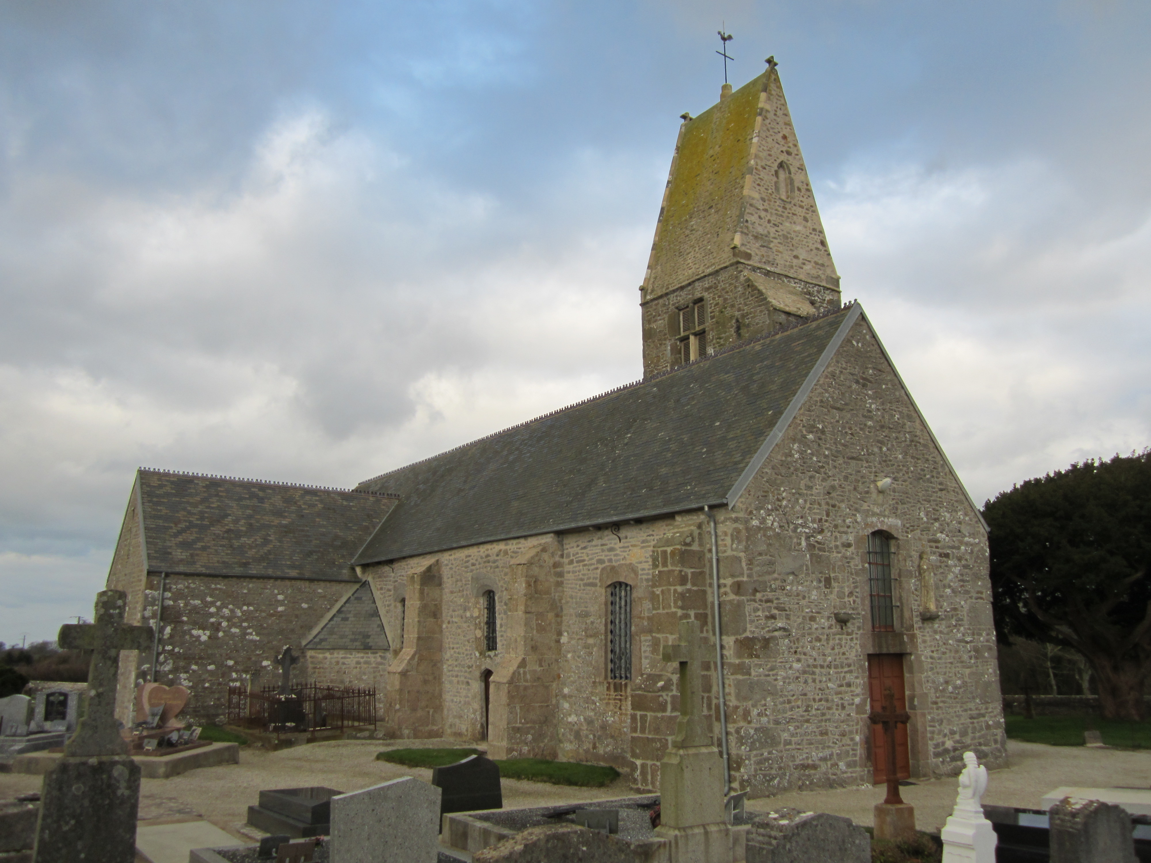 Église Notre-Dame de Clitourps